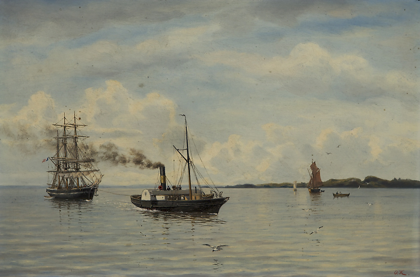 Kleineh, Oscar (1846-1919) Tyven, öljy kankaalle, sign., 27,5 x 41